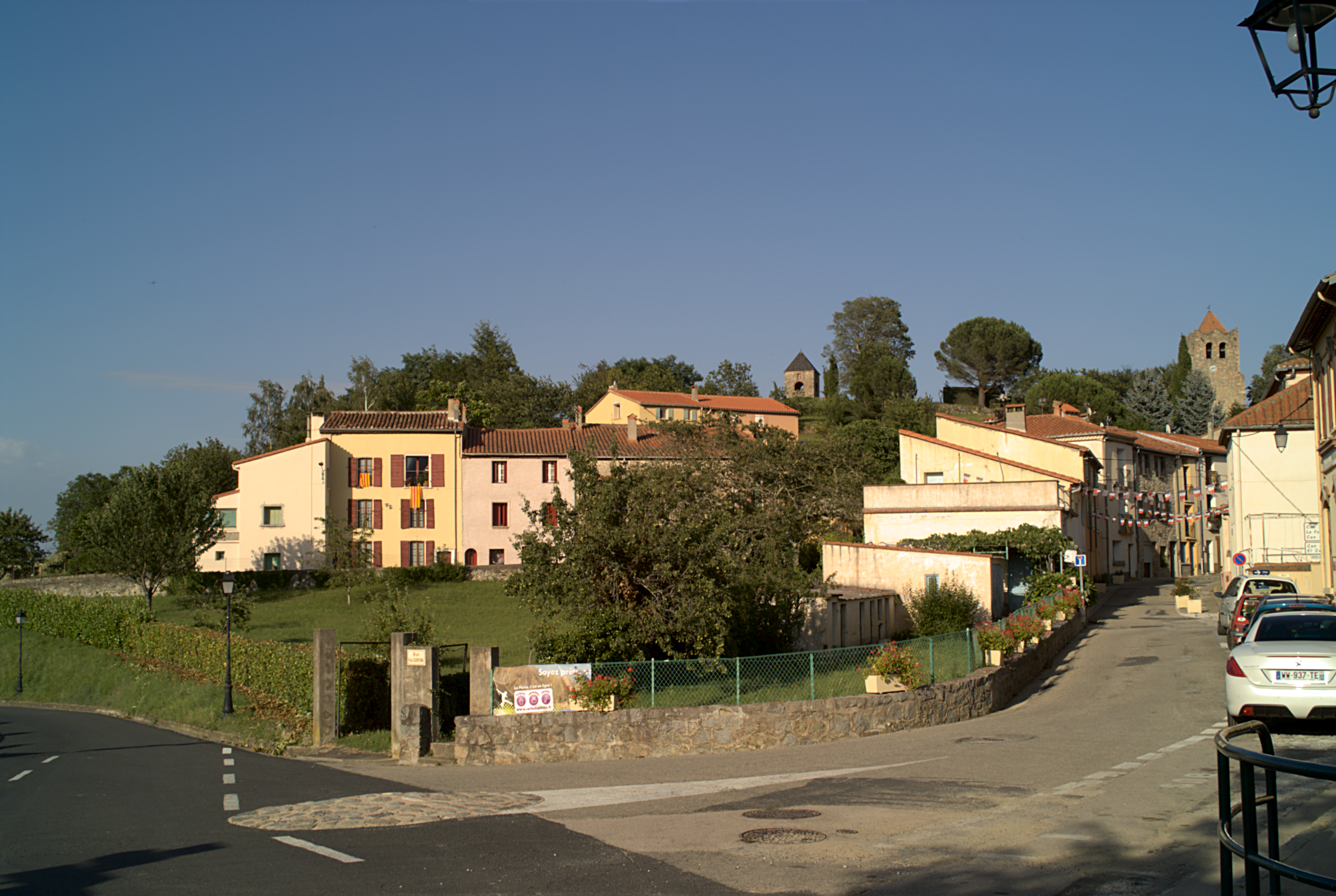 Carrefour de la rue Paul Santena et de la rue Abdon Poggi, au fond le Conjurador, Serralongue (Pyrénées-Orientales, Languedoc-Roussillon, France)